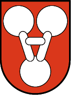 Wappen der Gemeinde Satteins, Vorarlberg. Verleihung 1929 nach dem Wappen der Edlen von Statteins (nach der Emser Chronik 1616). Die Bedeutung der Wappenfigur ist unklar: Egge oder umgestürzter Steigbügel.